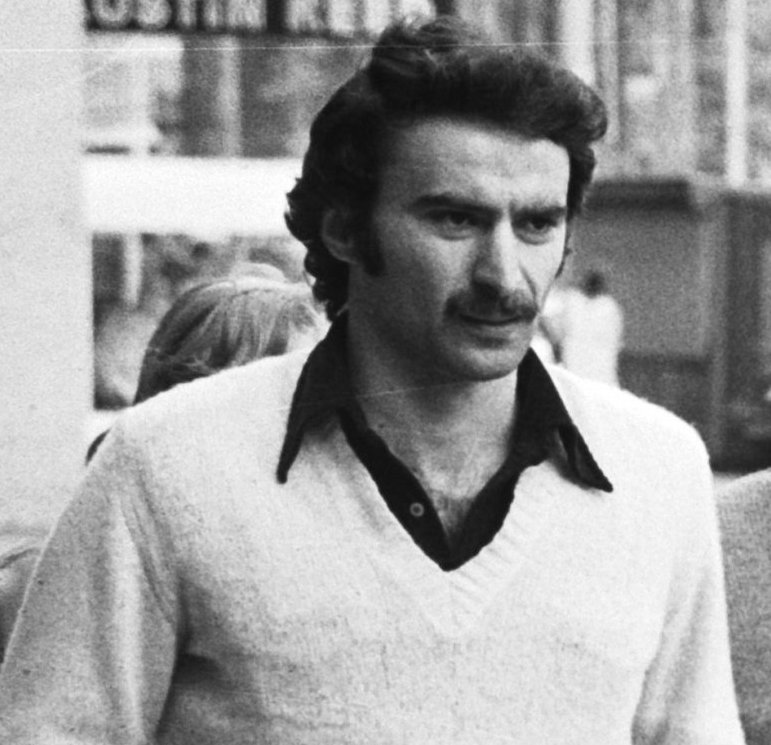 Morgen speelt Feyenoord tegen Dynamo Tiflis om de Europacup-II, de top van Dynamo Tiflis v.l.n.r. Chivadz Gutzaev en Kipiani